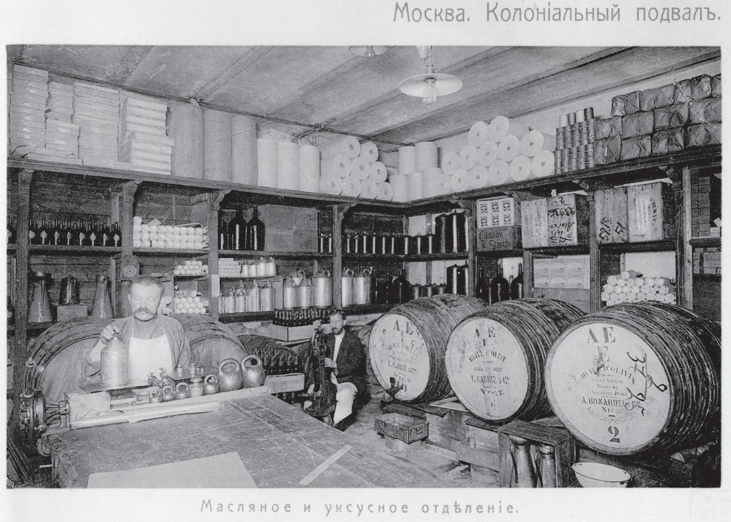 Магазин Елисеева и погреба русских и иностранных вин. Маслянно-уксусное отделение